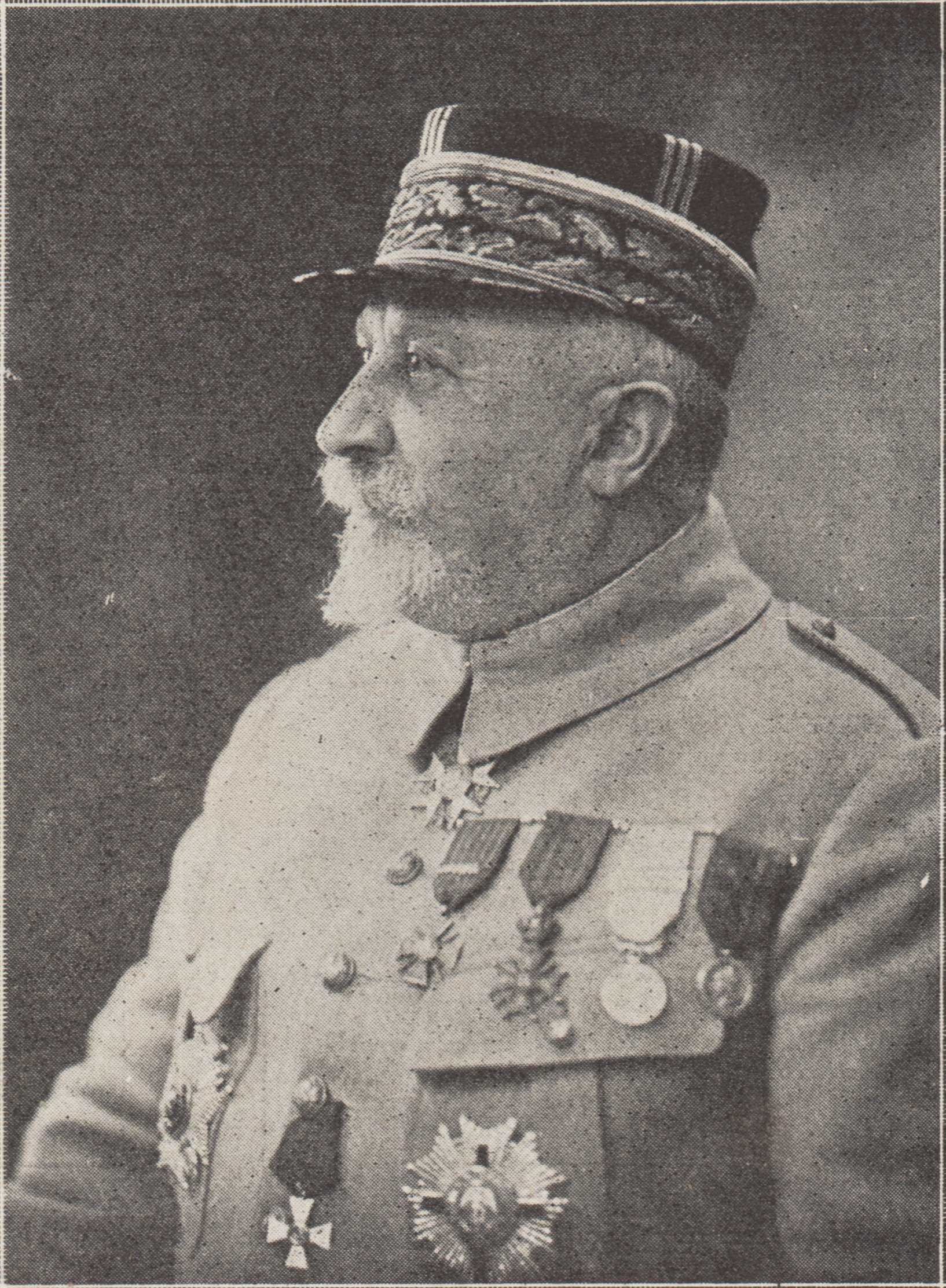 Scan of L'ILLUSTRATION No 3906 12 Janvier 1918. Le général Grosetti